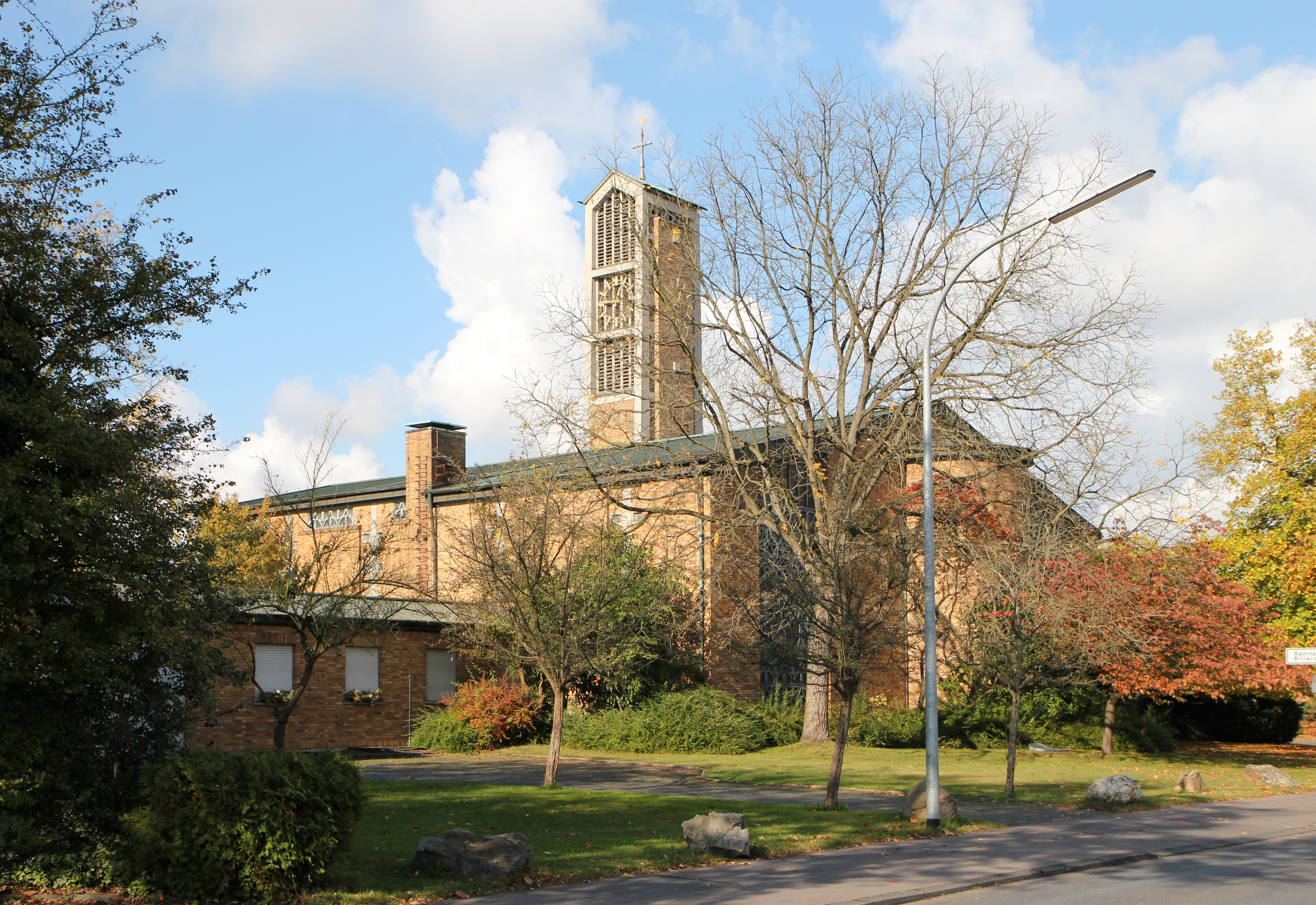 St. Wendelinus, Hürth-Berrenrath. Ansicht der Ostseite